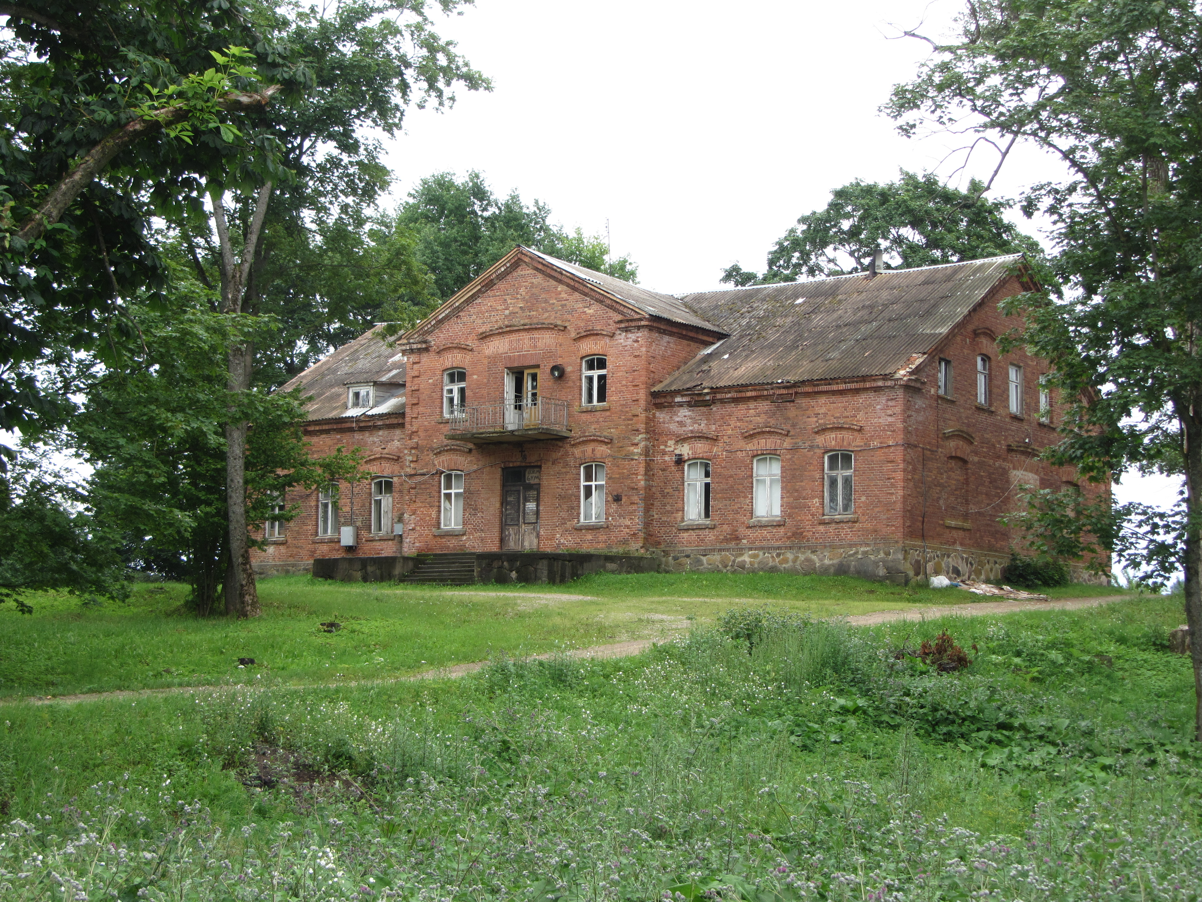 Jotaučiai 28425, Lithuania